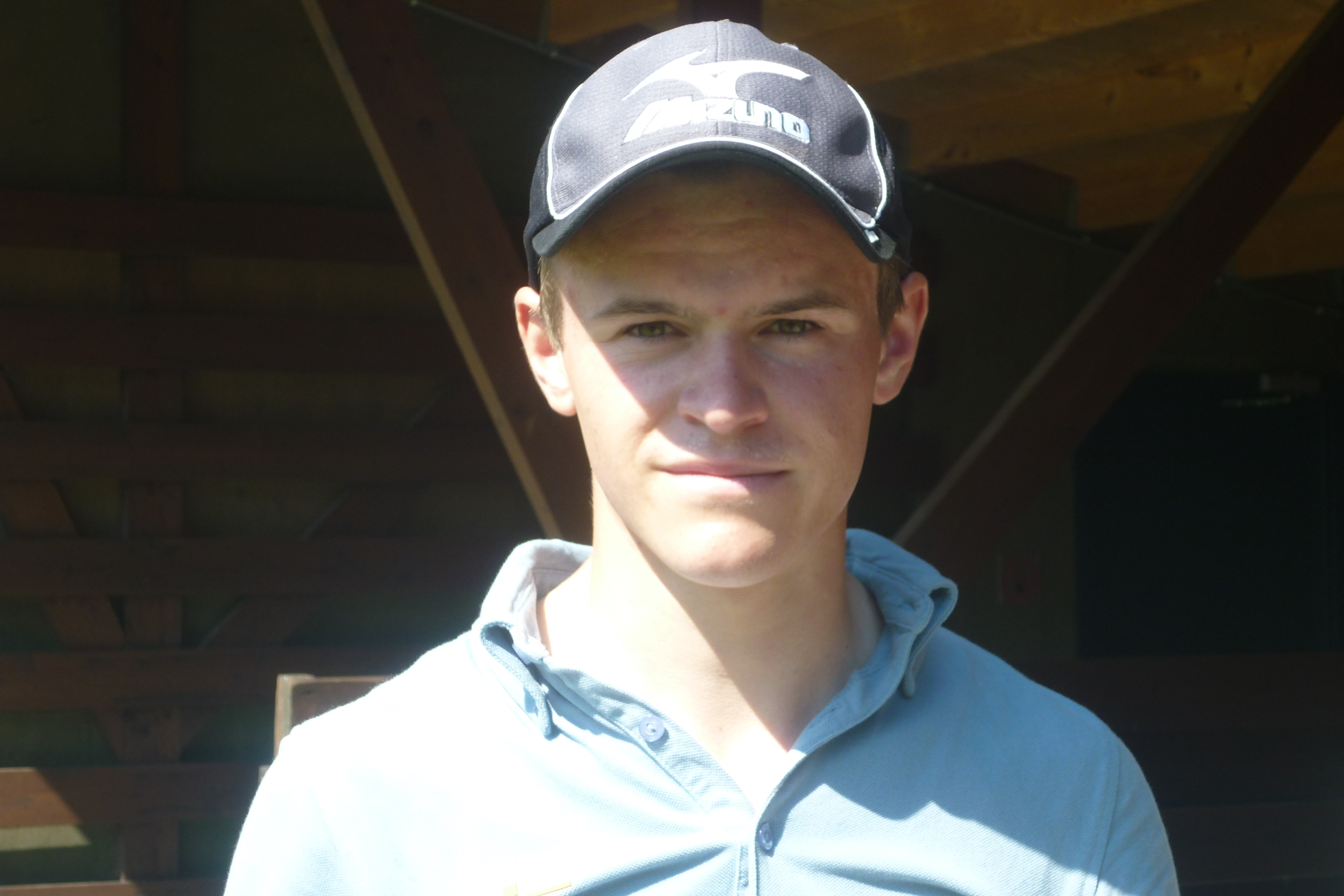 Daan Huizing Nationaal Open